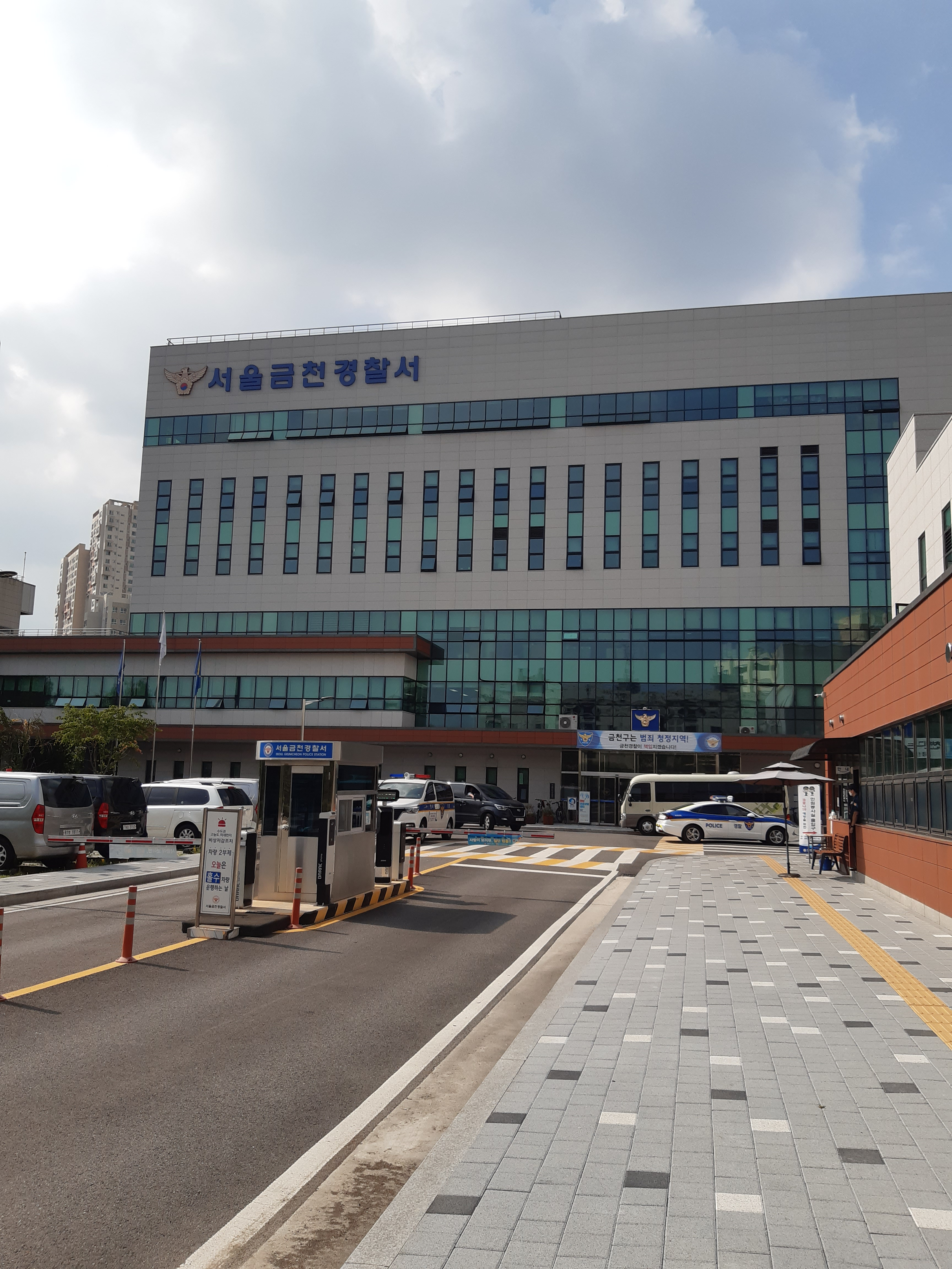 2020년 7월 서울금천경찰서